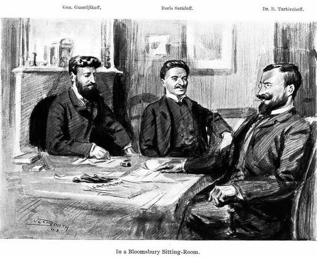 Михаил Герджиков, Борис Сарафов и Христо Татарчев четат вестник "Отономи"